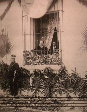 Presidente Manuel Estrada Cabrera observando procesiones desde la Casa Presidencial.